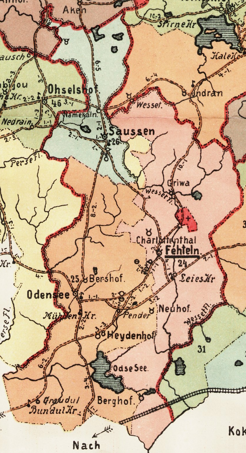 Vietalva kihelkonna mõisad 1903. aasta kaardil.